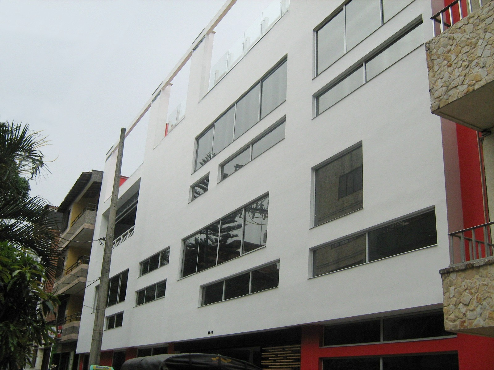 Fachada de la Biblioteca de Itagüí Diego Echavarría Misas, Colombia